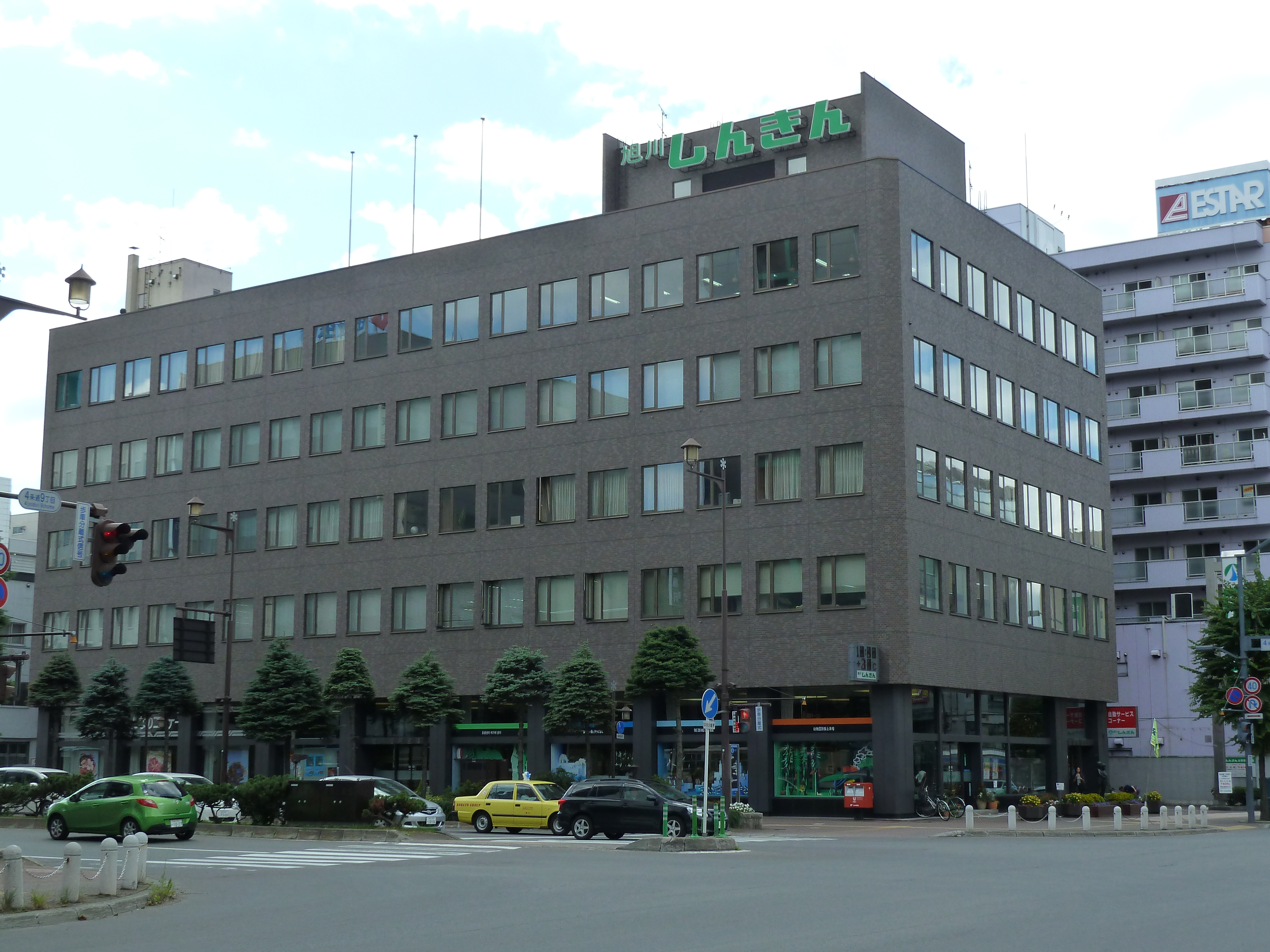 旭川信用金庫本店